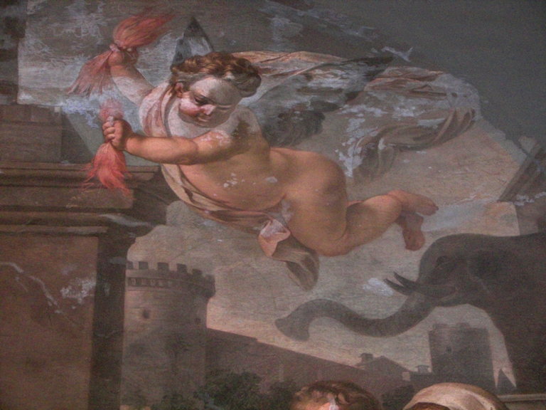 San Leone Taumaturgo che sconfigge il mago Eliodoro. Olio su tela del secolo XVIII di Matteo Desiderato. Chiesa Madre di Santa Maria di Licodia.